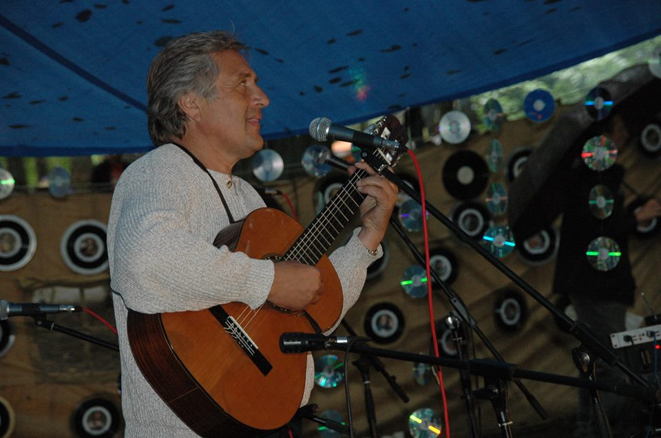 Щирин Олександр 2